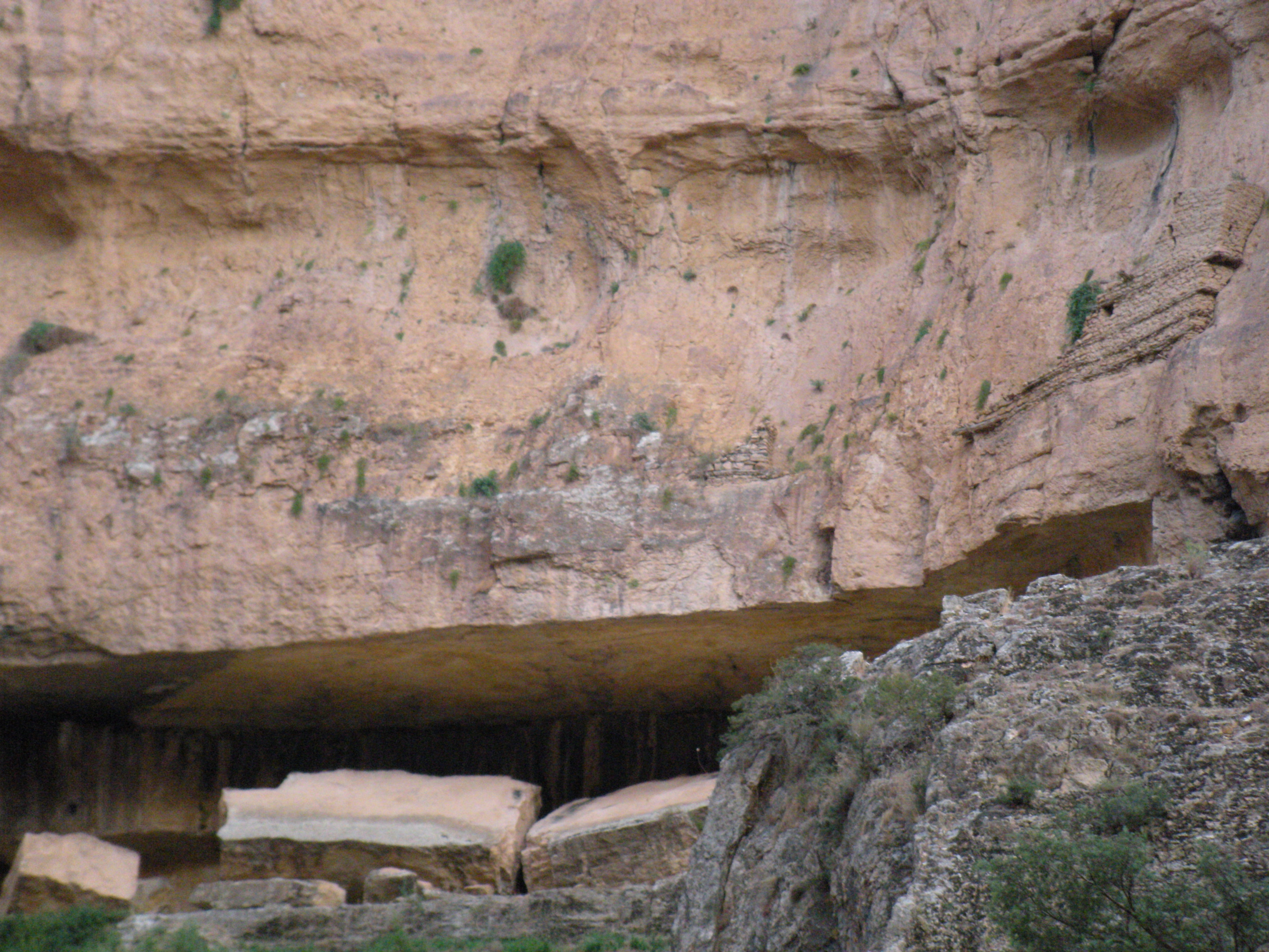 Grottes troglodytes de Maafa (Algérie) avec la grotte en dessous et les restes de l'habitation au dessus